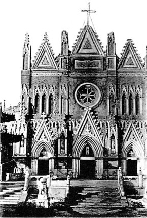 photo from Ein Tagebuch in Bildern